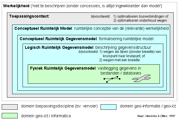 Zelfgemaakte media. Gedeeltelijk op basis van input van theorie uit 'Geografische Informatie Systemen in ruimtelijke onderzoek' (P. Hendriks & Henk Ottens, Van Gorcum & Comp B.V. Assen, 1997) is dit schema opgsteld. Het beschrijft de relatie tussen verschillende logische, conceptuele en gegevensmodellen.